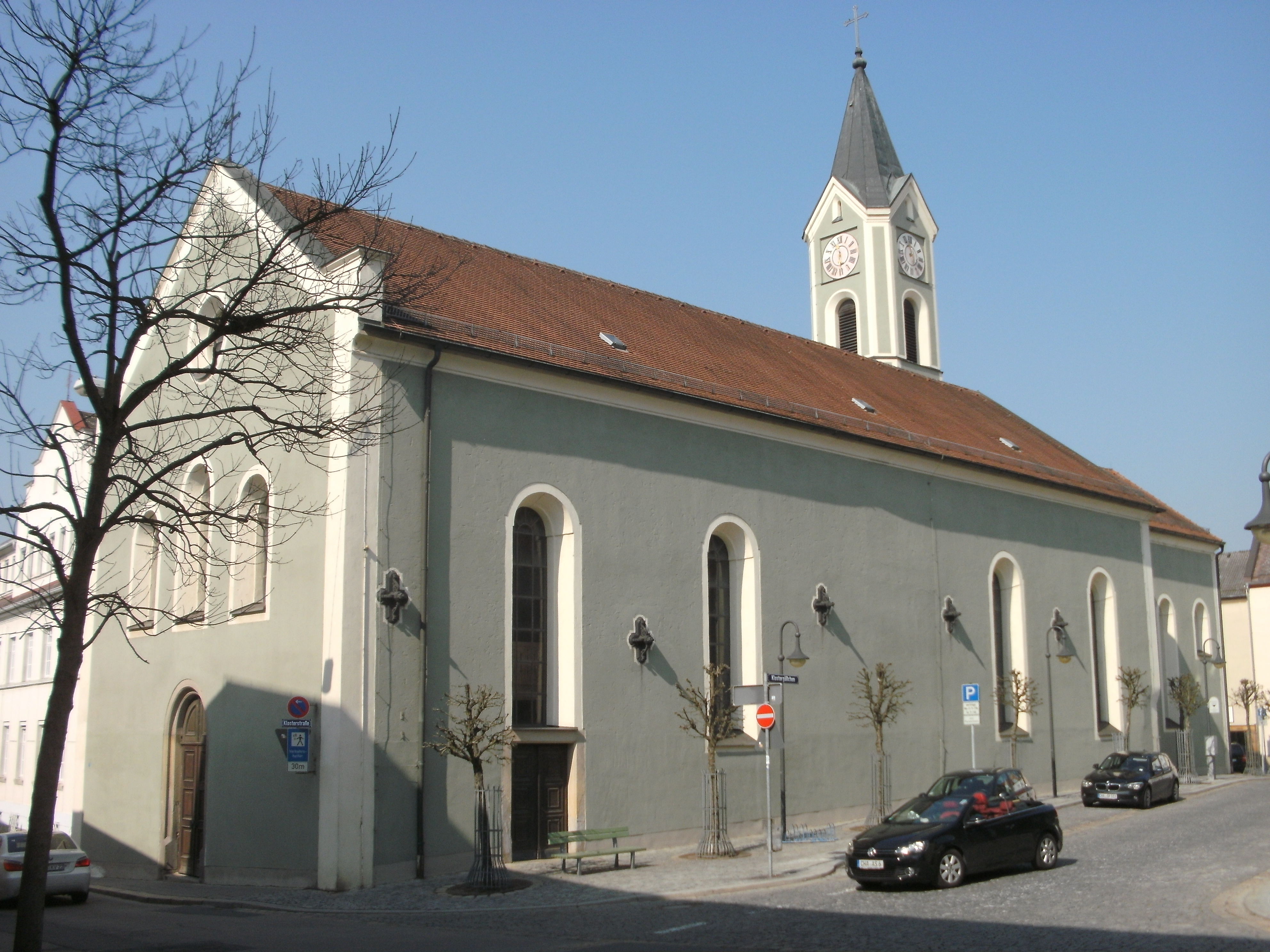 Cham, ehemalige Franziskanerkirche, Klosterstraße 2